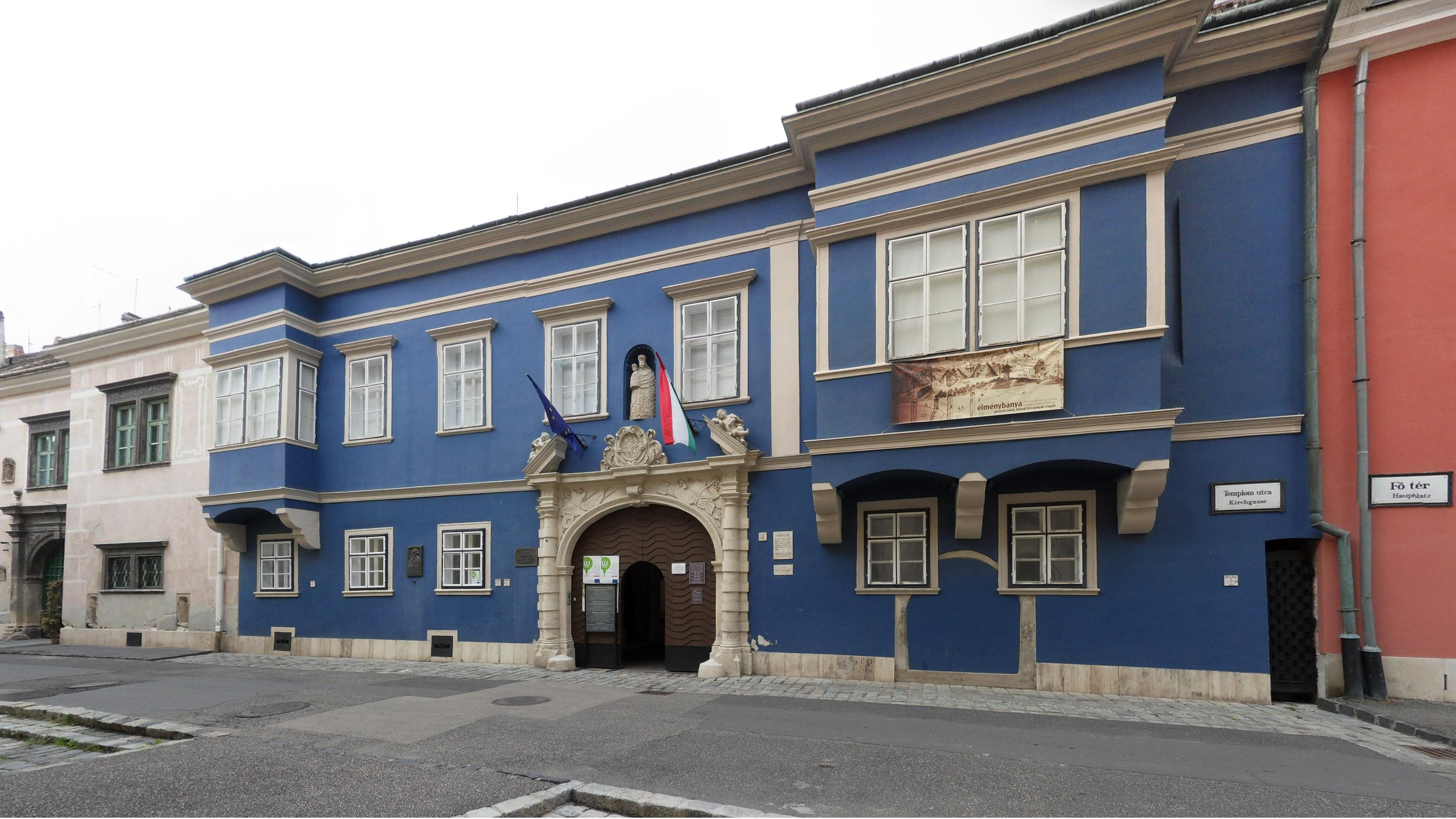 Esterházy-palota Sopron Templom utca This is a photo of a monument in Hungary. Identifier: 4974